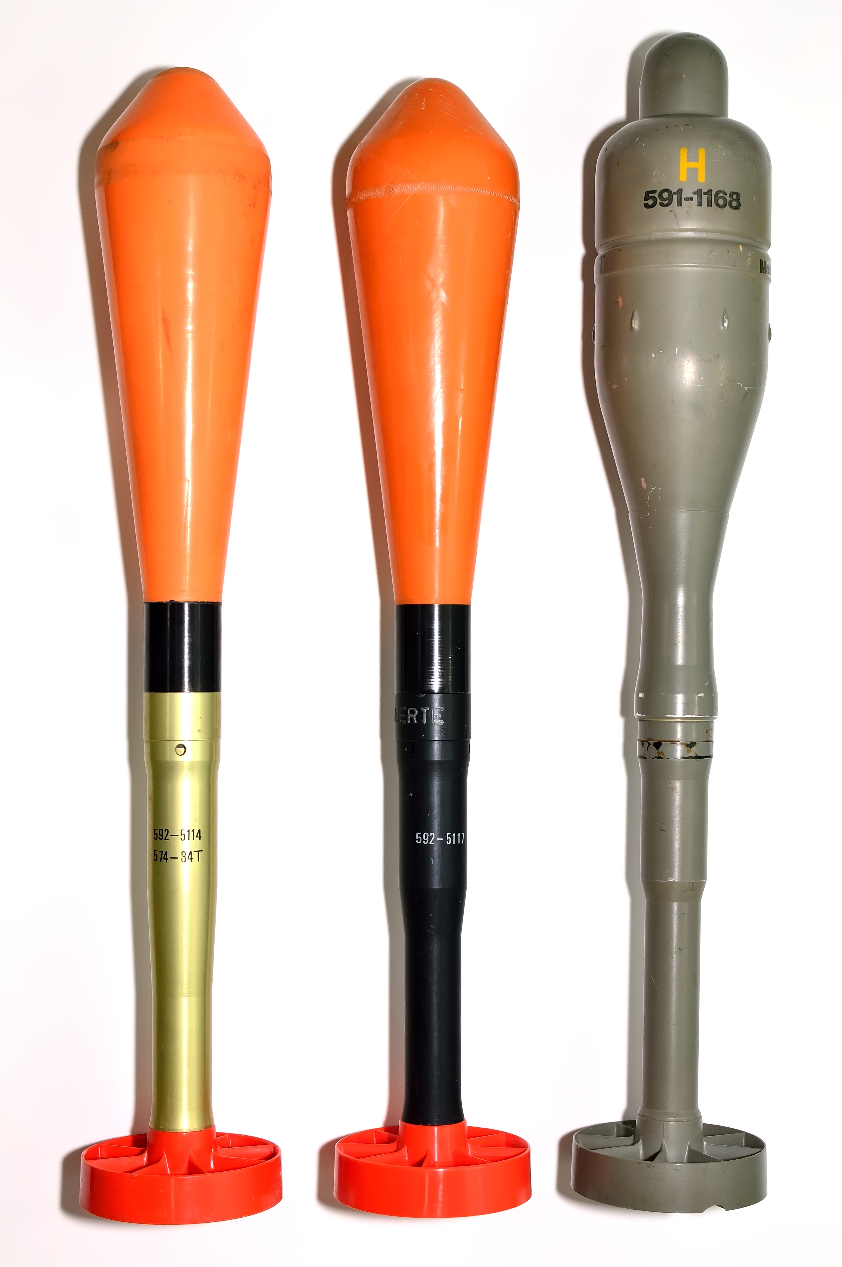 Grenade d'exercice 58 avec charge propulsive additionnelle, grenade d'exercice 58 sans charge propulsive additionnelle, grenade perforante à charge creuse 58